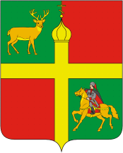 Герб Красноармейского района Краснодарского края